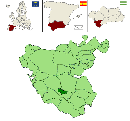 Mapa de localización del municipio gaditano de Benalup Casas Viejas (Andalucía, España)